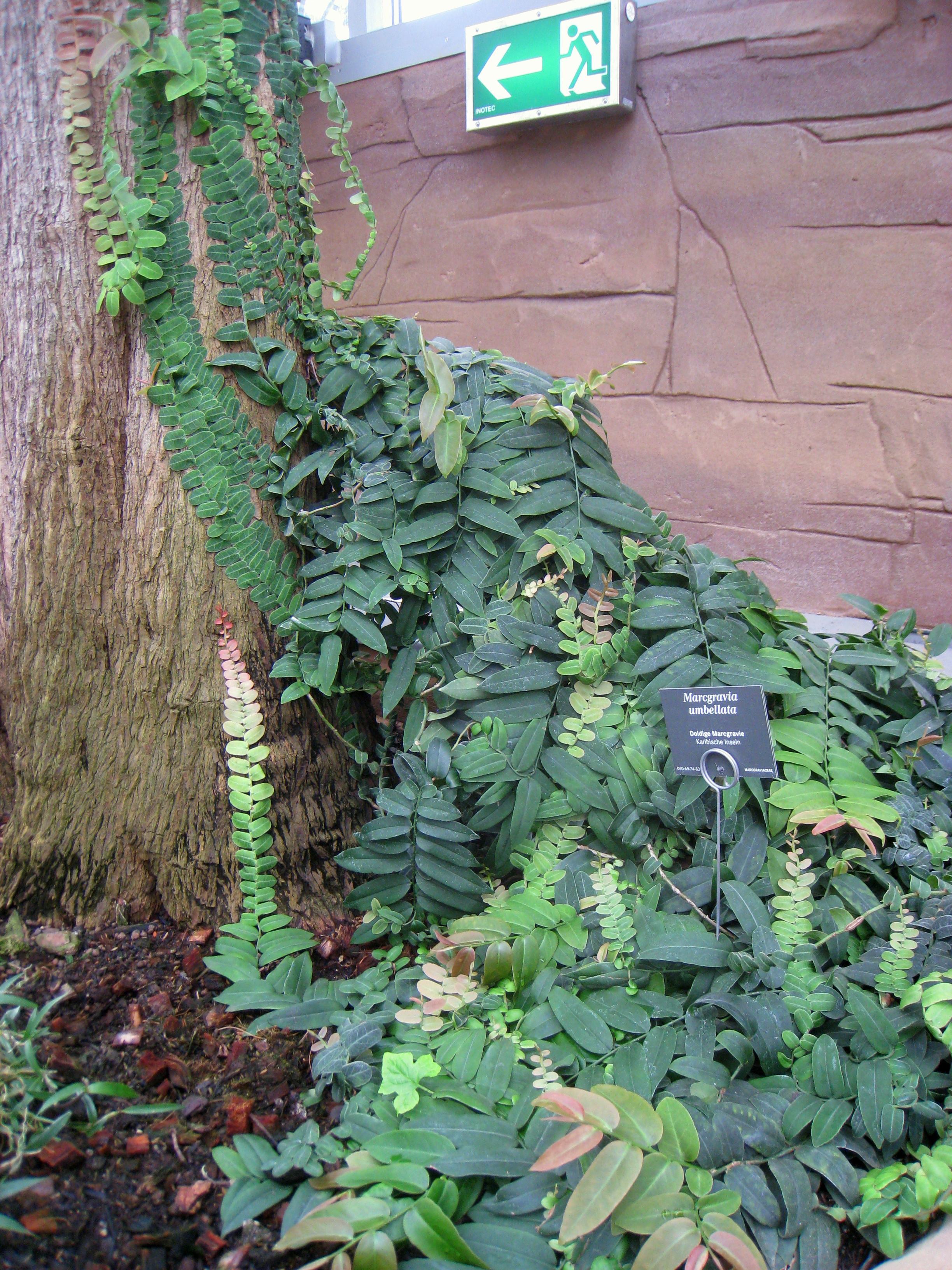 Marcgravia umbellata specimen in the Botanischer Garten, Berlin-Dahlem (Berlin Botanical Garden), Berlin, Germany.